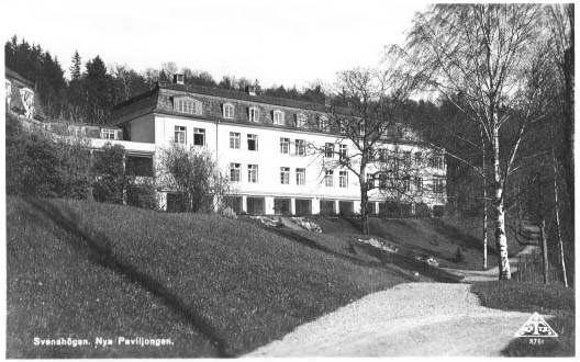 Svenshögens sanatorium, nya paviljongen